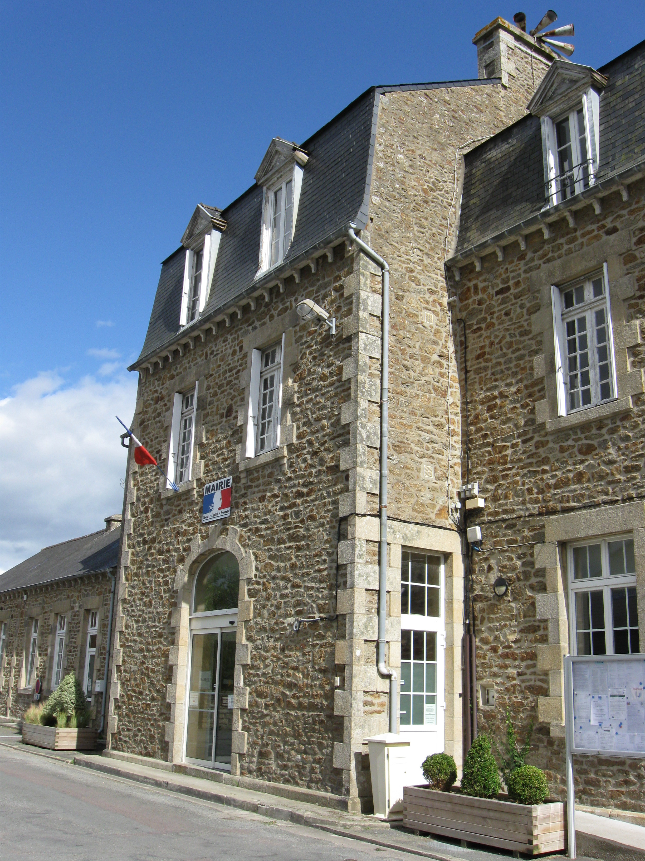 Mairie de Saint-Jacut-de-la-Mer. (Département des Côtes-d'Armor, région Bretagne).